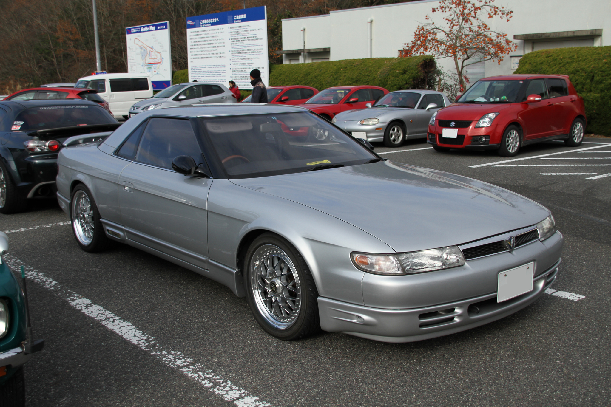 2011年12月11日。岡山国際サーキットにて撮影。